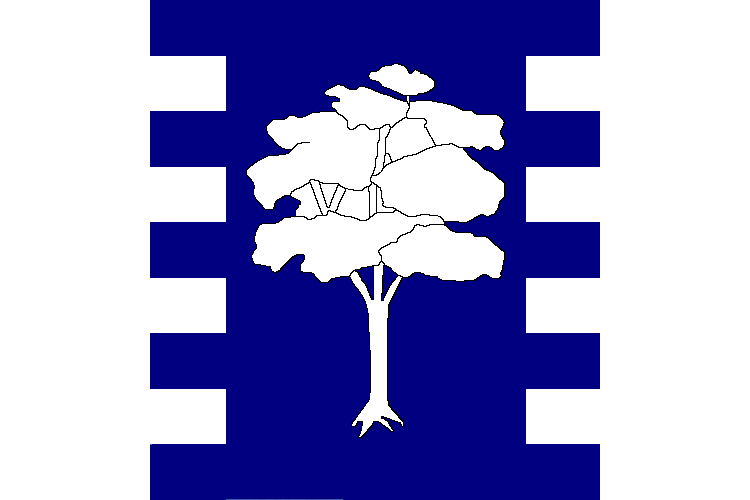 Bandera del municipio malagueño de Algarrobo